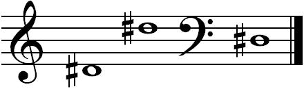 Nuty dis na pięciolinii.